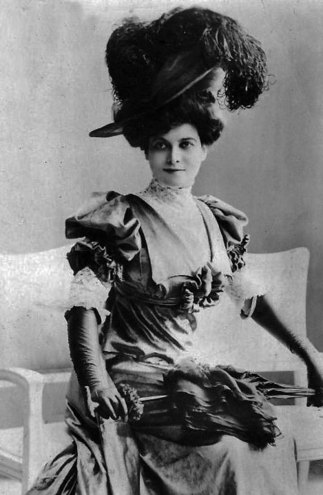 Amanda Personne